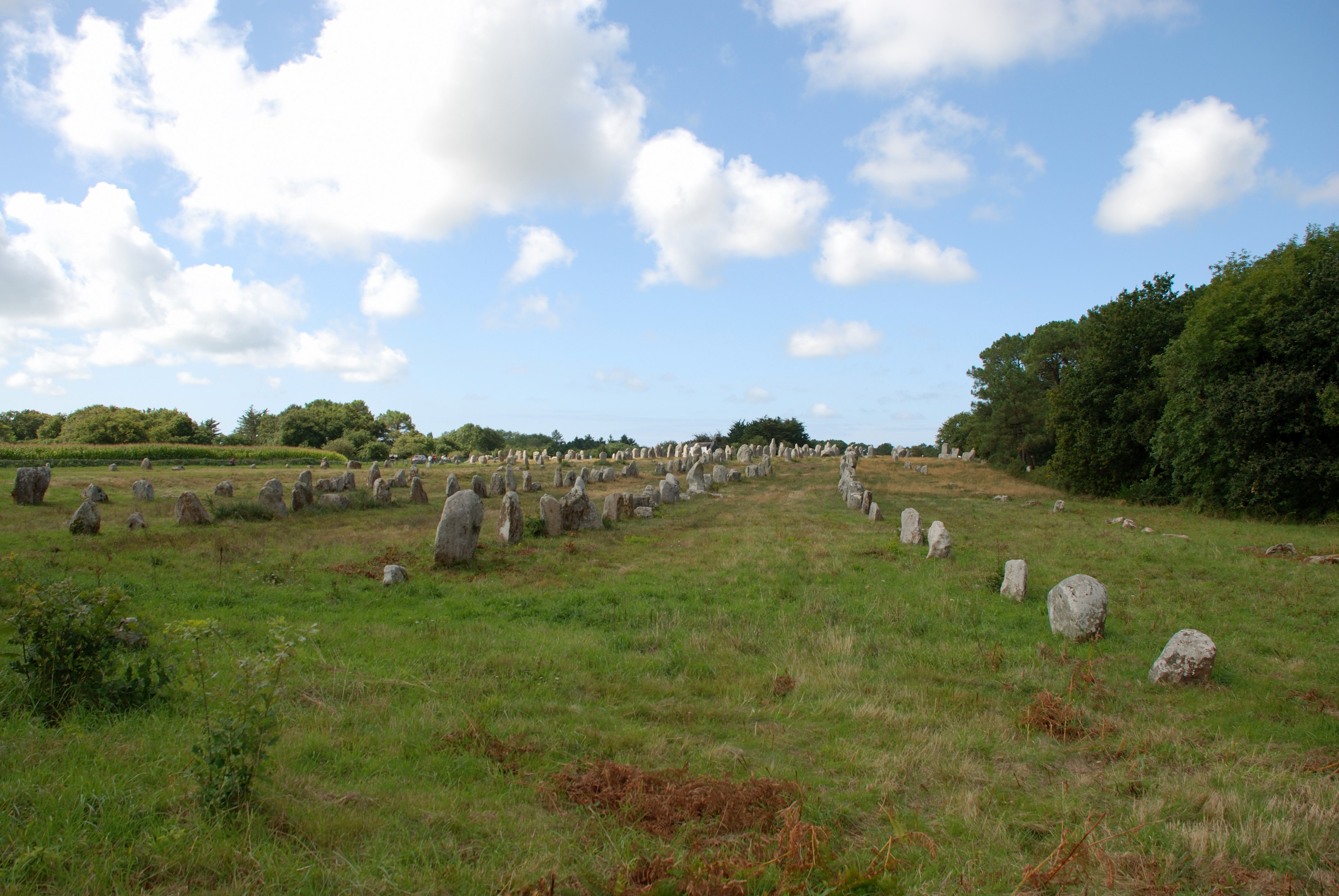 kermario alignments/alinhamentos/alineamientos